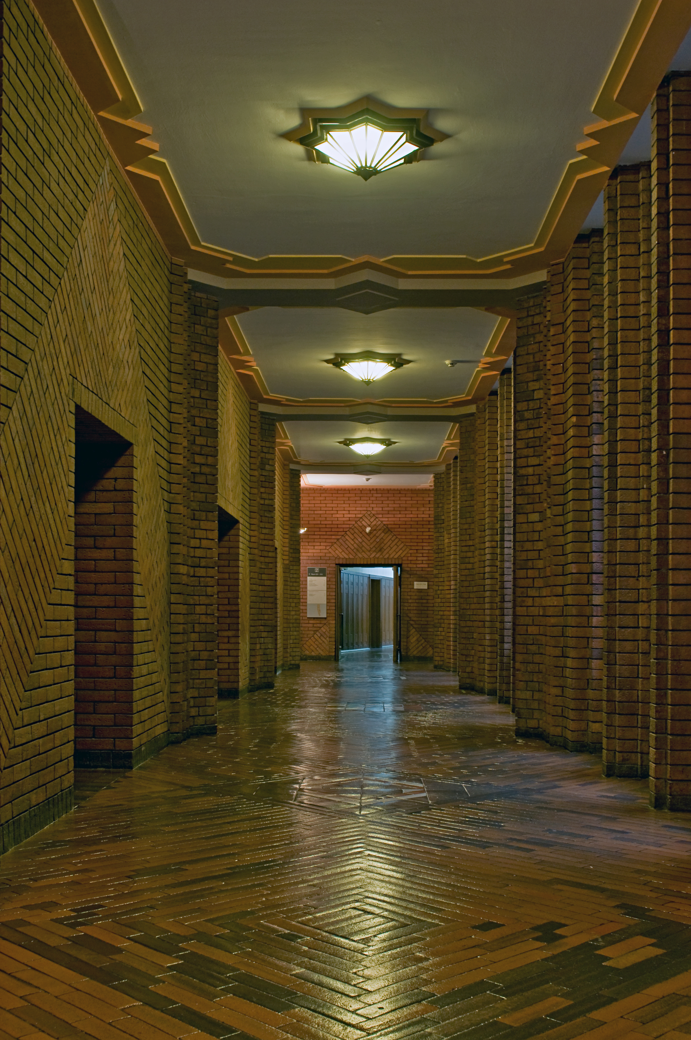 Industriepark HöchstBehrensbau: Verklinkerter Innengang mit Seitentüren